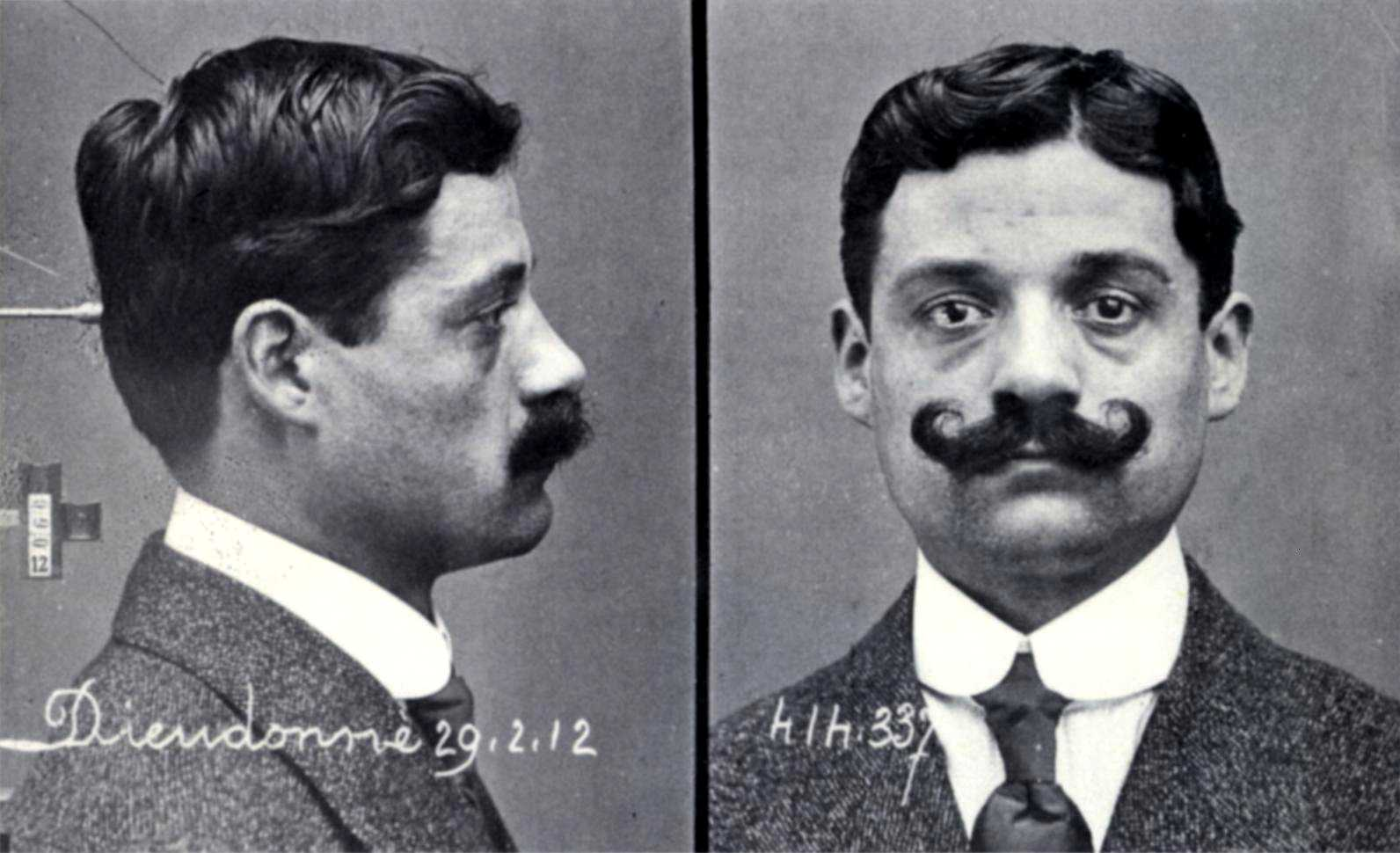 O anarquista ilegalista francês Eugène Dieudonné que na segunda década do século XX acabou juridicamente envolvido em uma acusão de participação em uma das ações do Bando Bonnot.